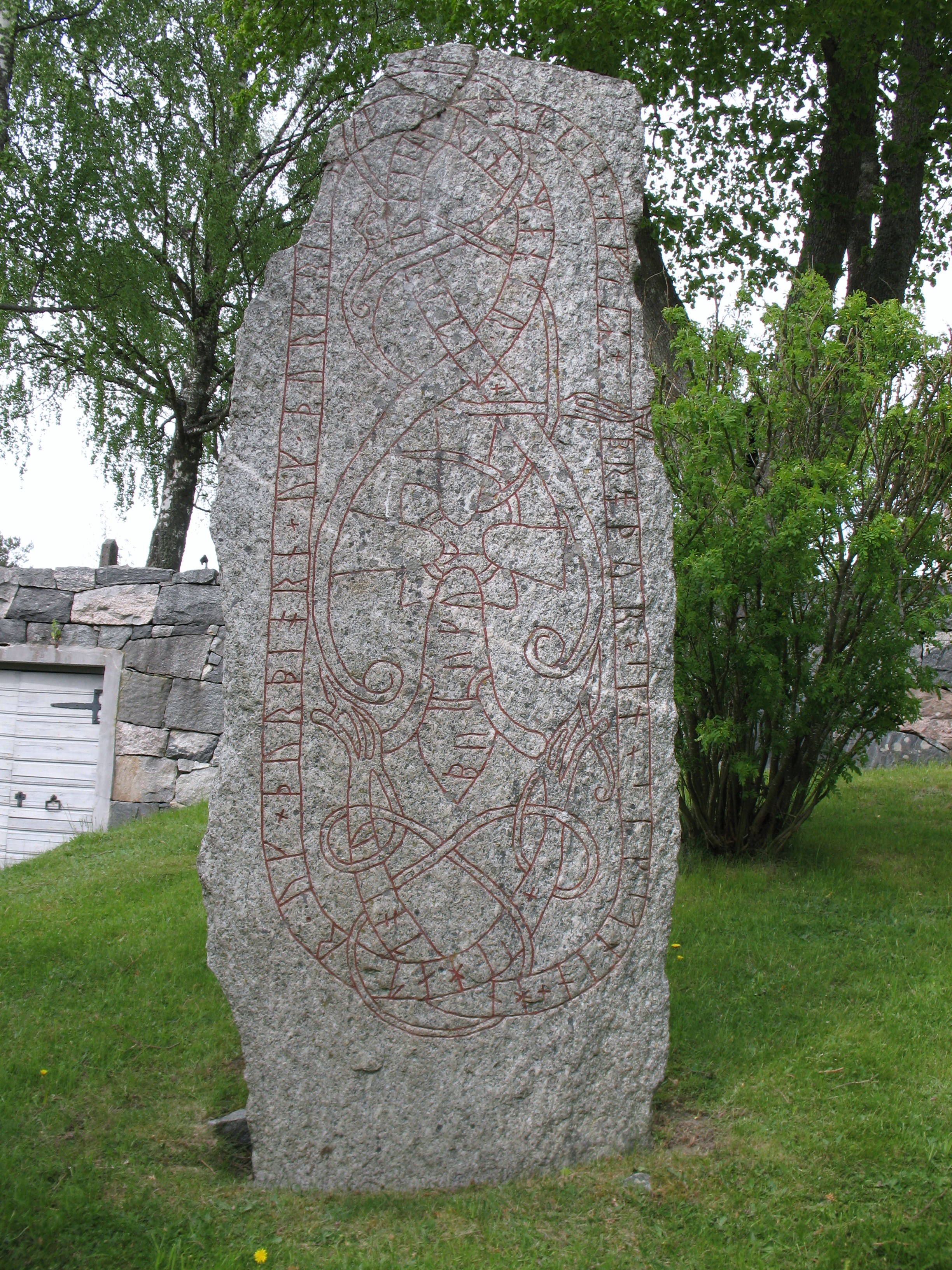 Runsten U 180 vid Össeby-Garns kyrka, Vallentuna.